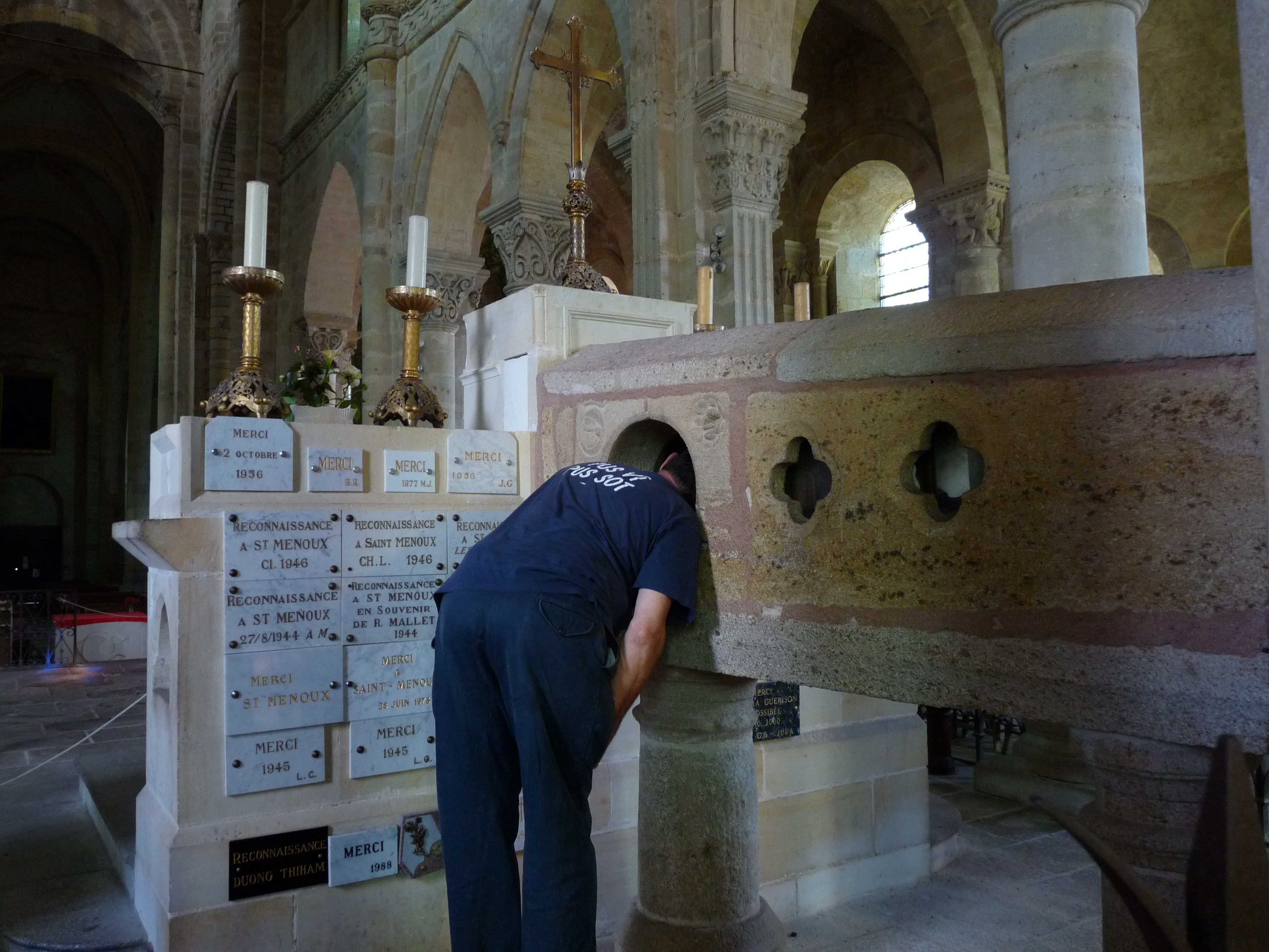 Le débredinoire de l'église romane de Saint-Menoux (Allier), utilisé par un touriste qui espère ne plus être "bredin"